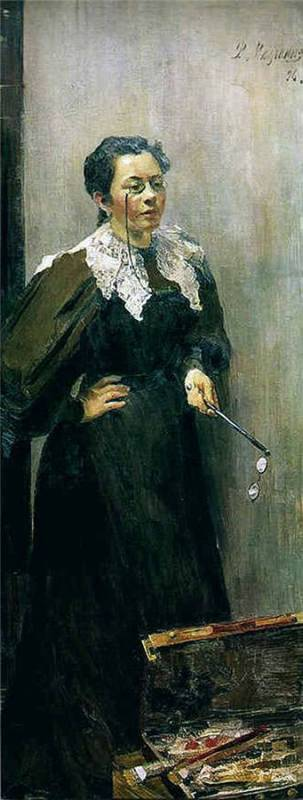 Остроумова-Лебедева, Анна Петровна